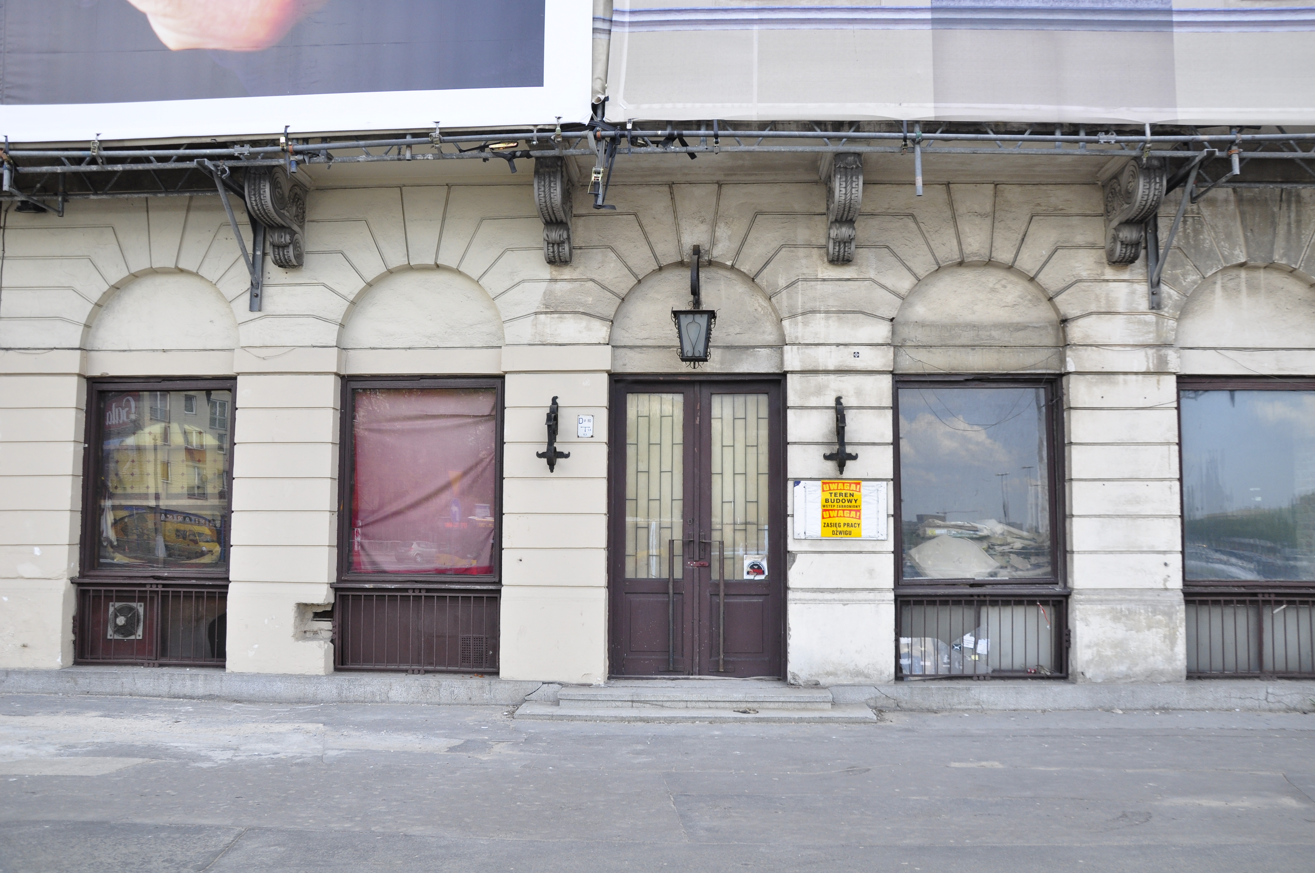 Hotel Saski, Warschau, Umbau zum Bürogebäude, mittiger Haupteingang an Frontseite (zum Plac Bankowy)